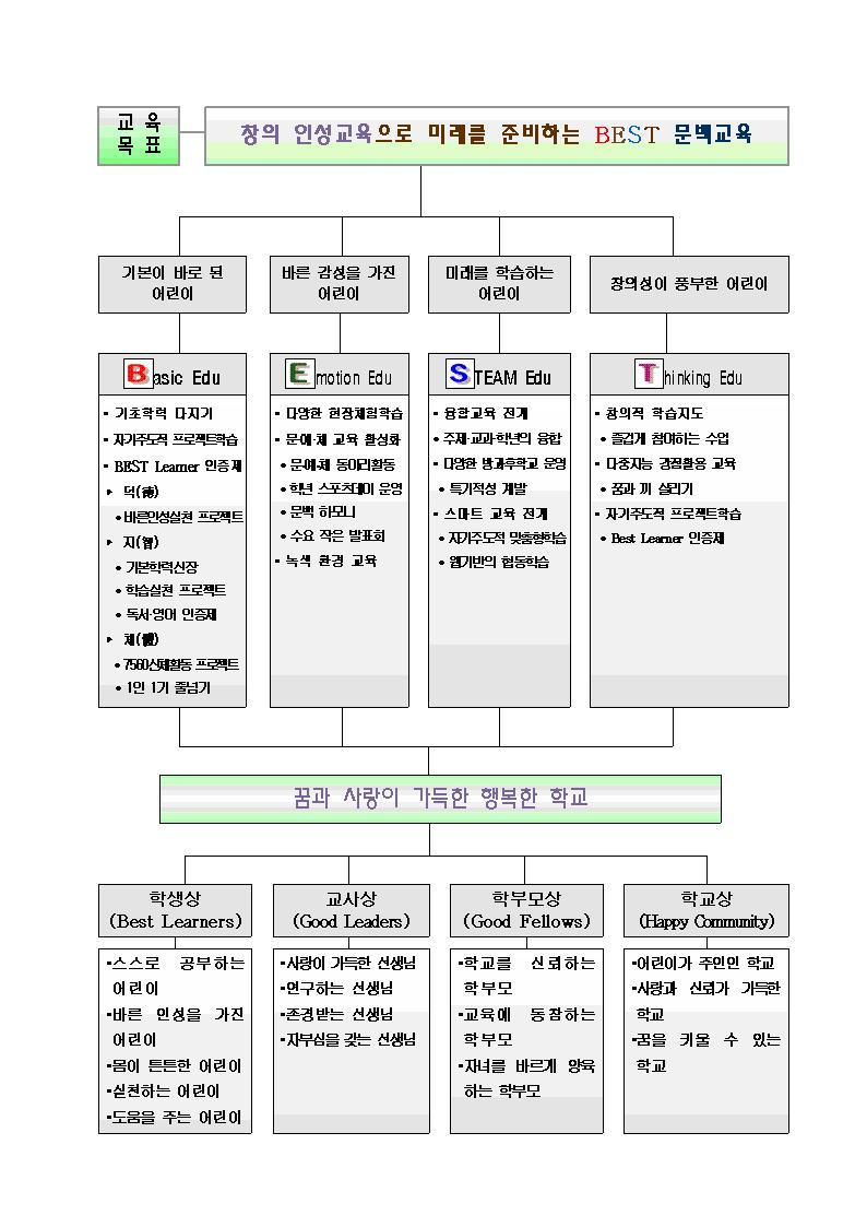 서울문백초등학교 교육목표